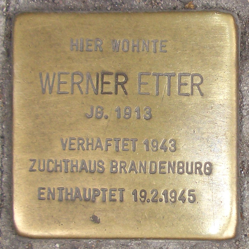 Stolperstein für Werner Etter vor dem Gebäude Alsterdorfer Straße 40 in Hamburg-Winterhude.